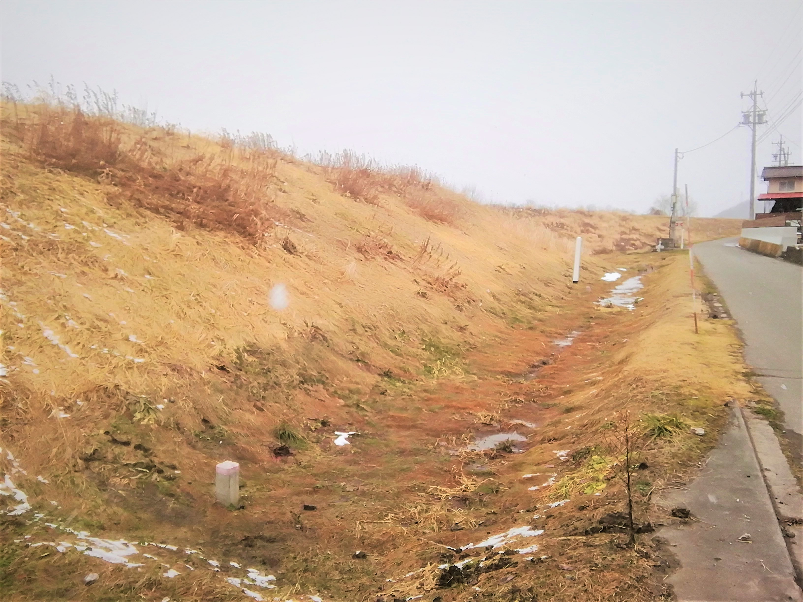 柳沢遺跡の現在（2020-2-18）